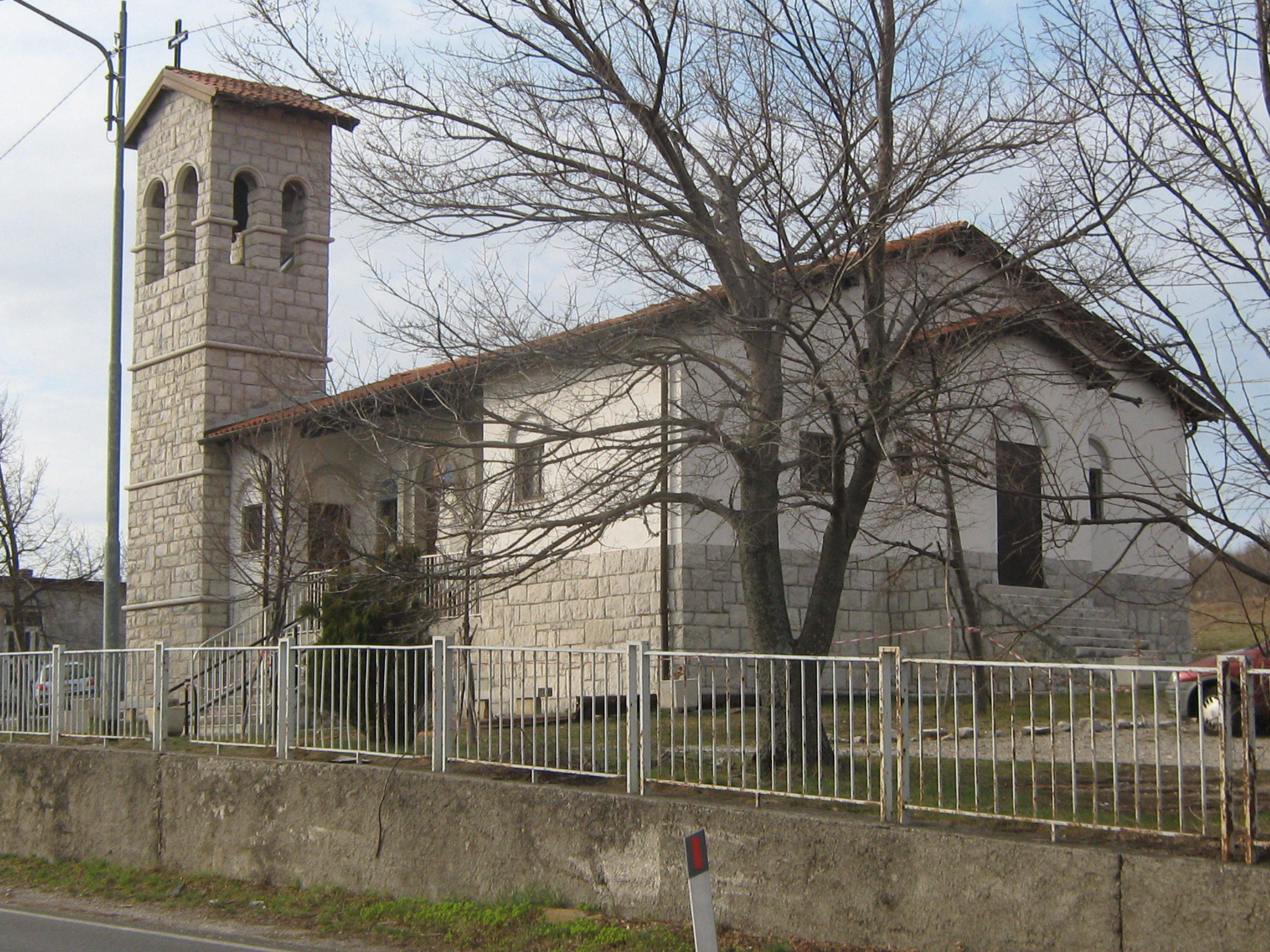 Pesek di Grozzana, Chiesa